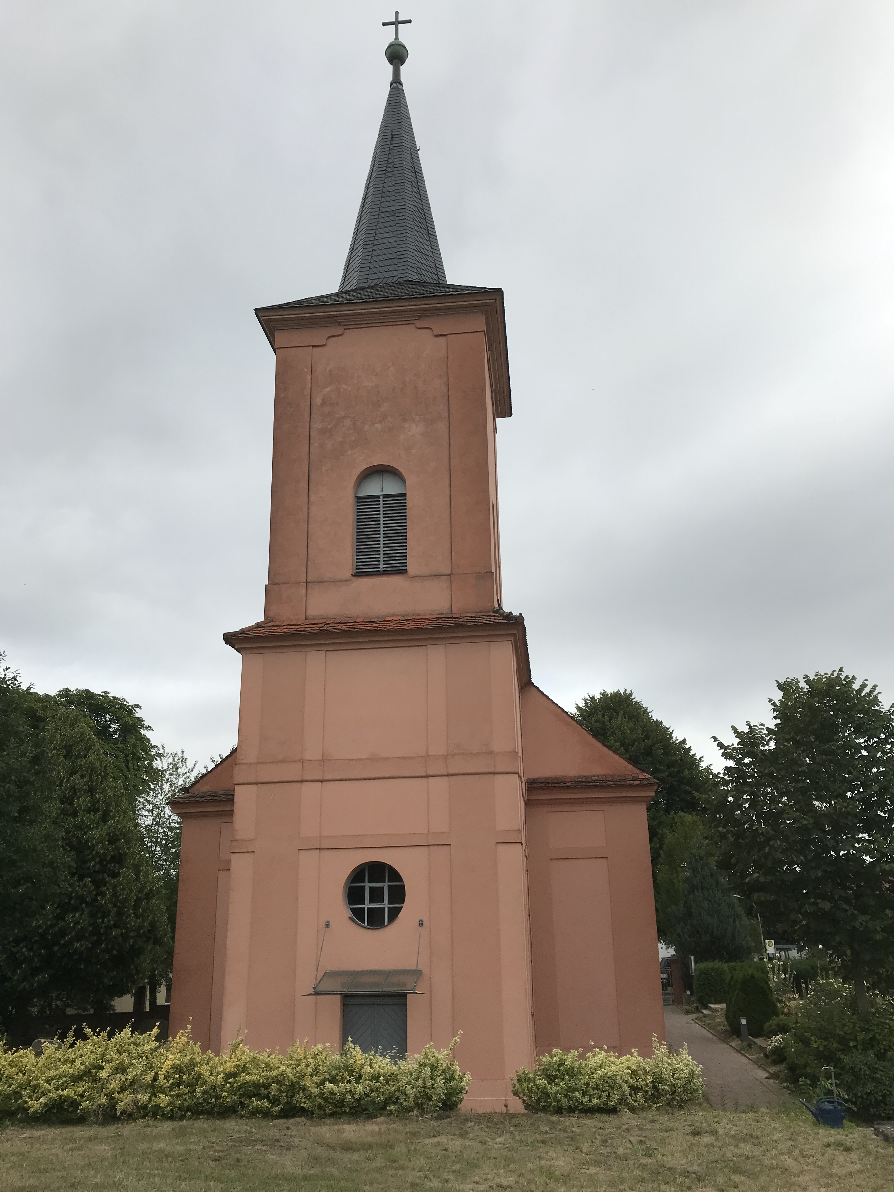 Die Dorfkirche Phöben ist eine Saalkirche aus dem Jahr 1758 in Werder (Havel). Im Innenraum stehen unter anderem eine polygonale Kanzel sowie eine Hufeisenempore.